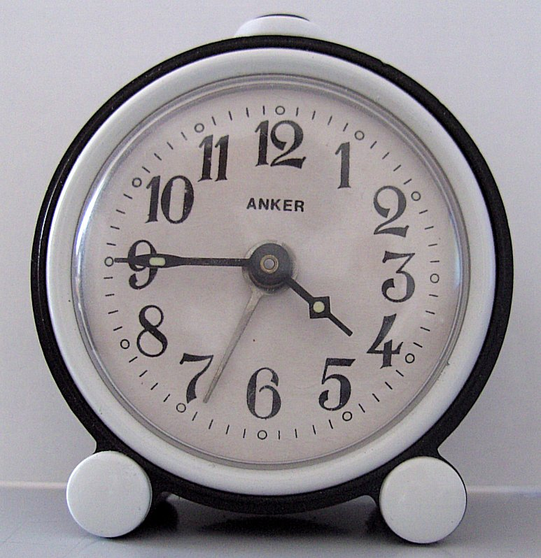 Ein Wecker mit Radiumbeschichtung auf dem Zifferblatt